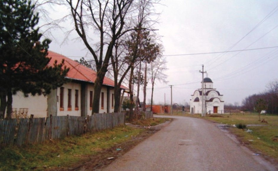 Средиште Тулара.